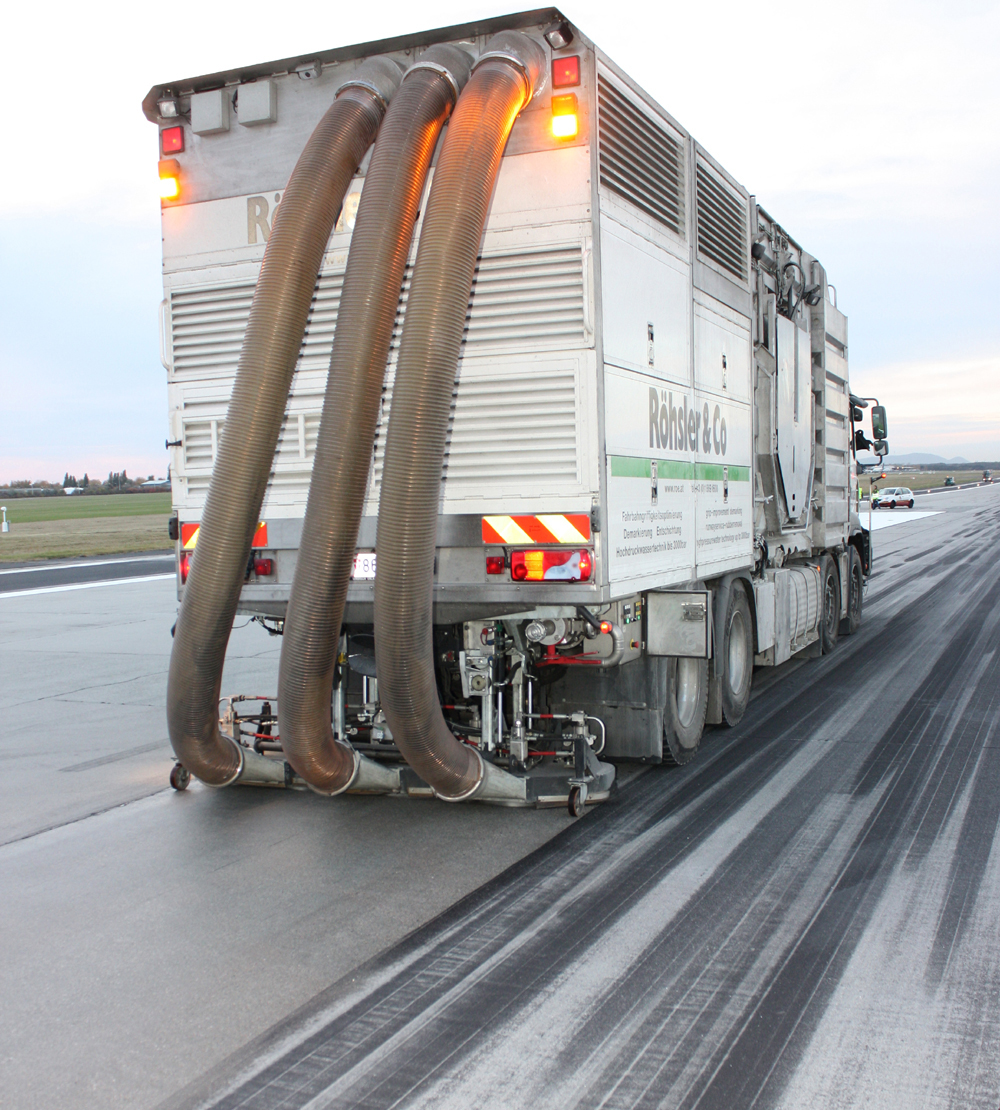 Entfernen von Gummiabrieb auf Landebahnen